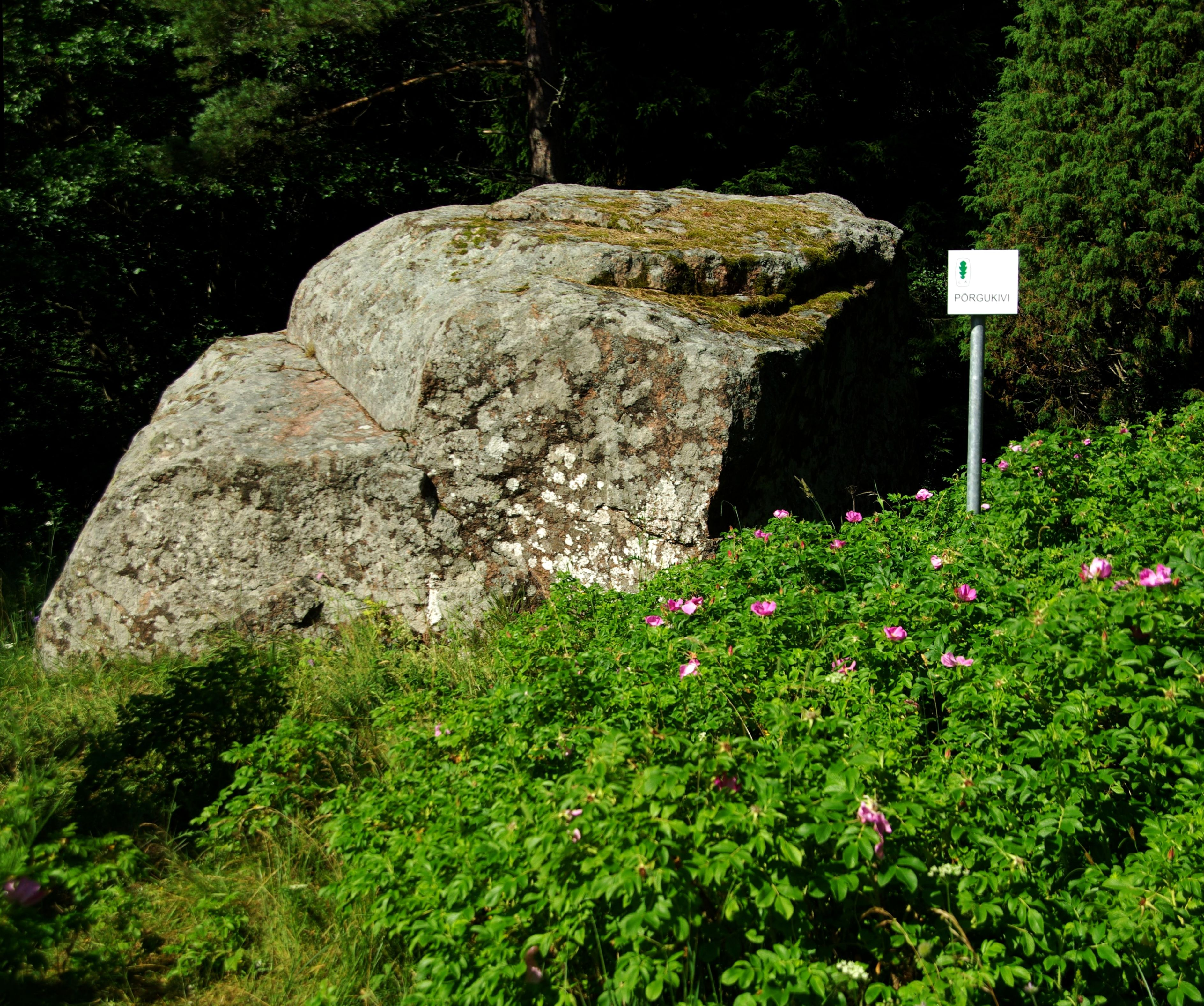 Põrgukivi